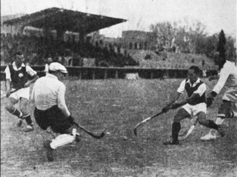 Αθλητές του Παναθηναϊκού σε αγώνα χόκεϊ επί χόρτου στη Λεωφόρο